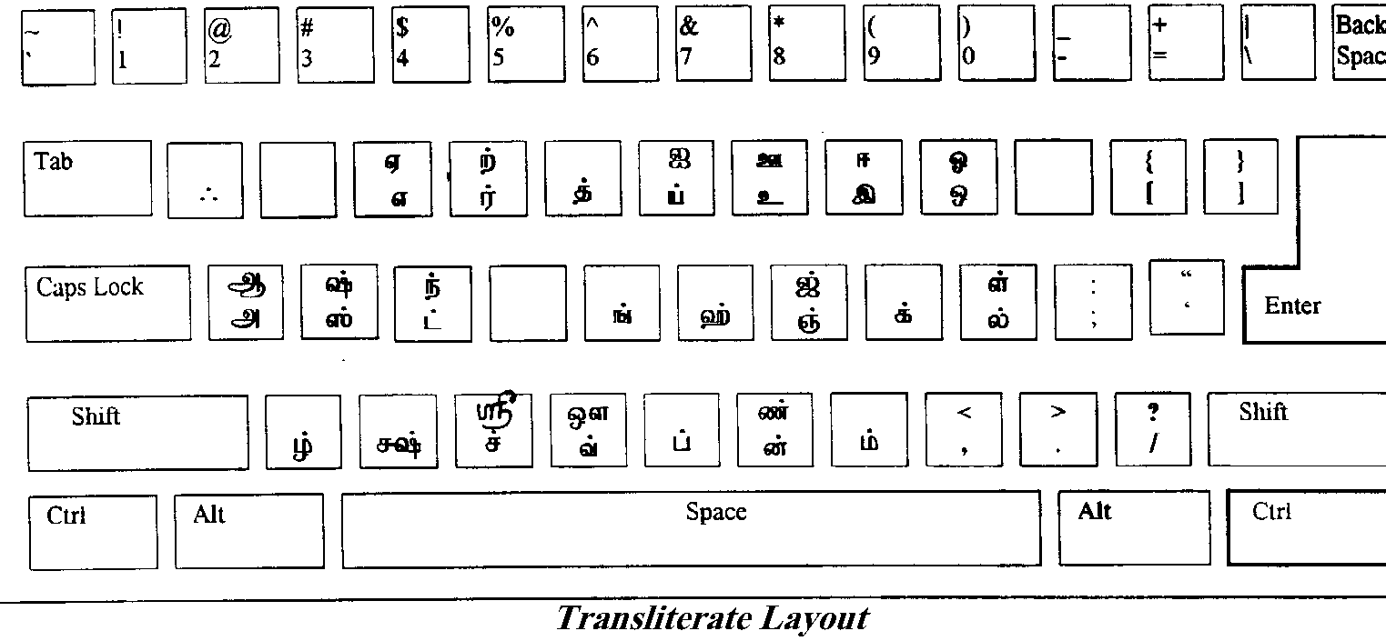 தமிழ் ஆங்கில ஒலியியல் முறை விசைப்பலகை வடிவம்